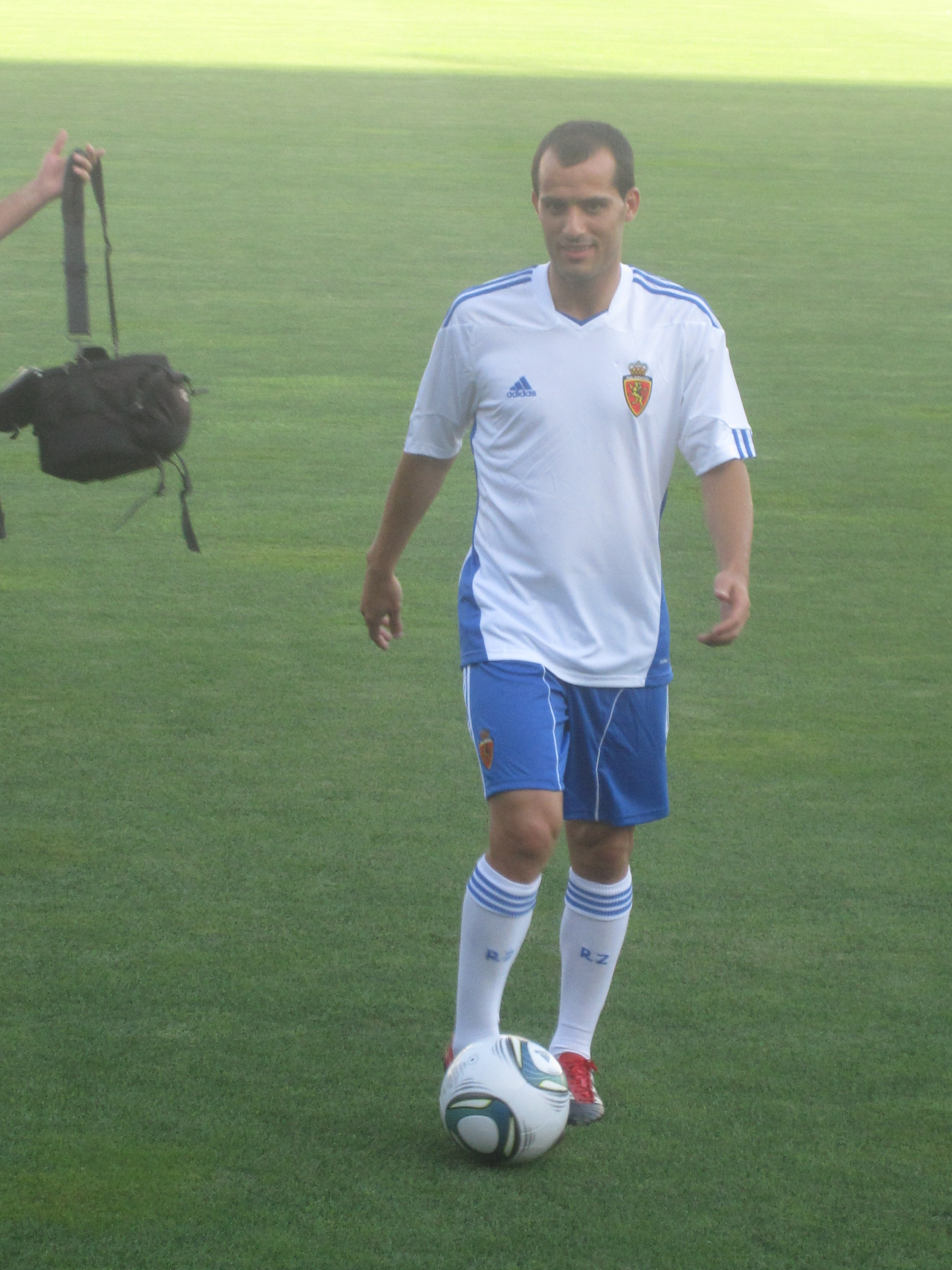 Ruben Micael el día de su presentación como jugador del Real Zaragoza en Agosot de 2011.